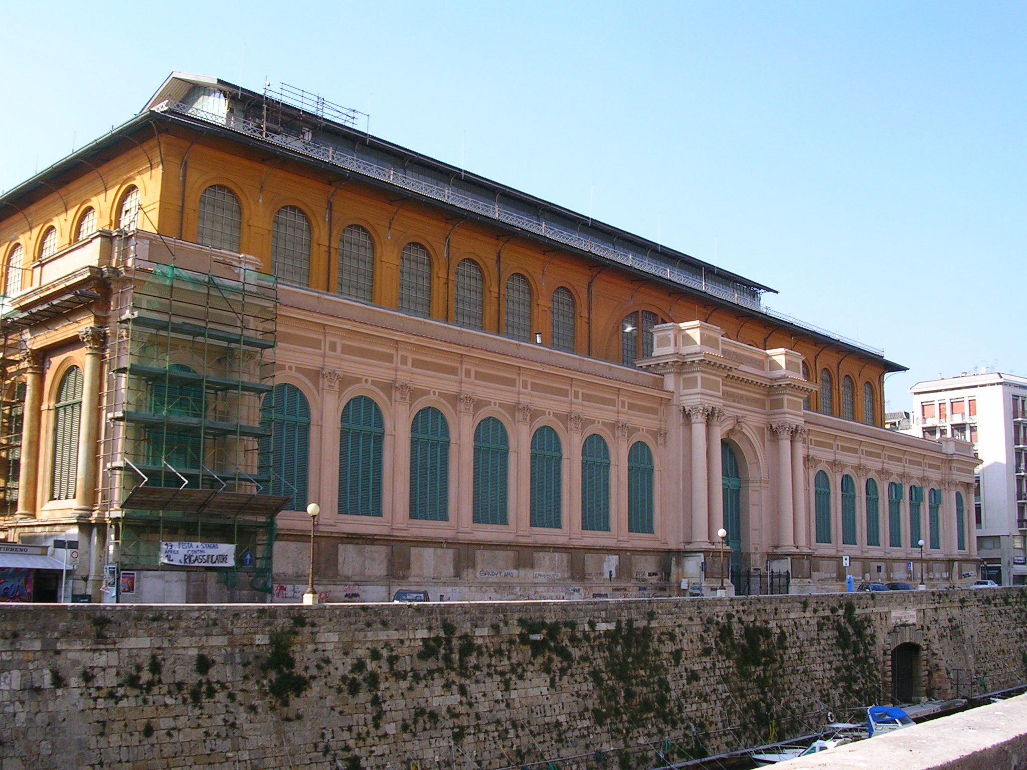 Livorno: il monumentale Mercato delle vettovaglie (o Mercato Centrale o Coperto), inaugurato nel 1894 e progettato da Angiolo Badaloni. In pianta il lato maggiore misura circa 95 metri e l'altezza massima è di 35 metri.